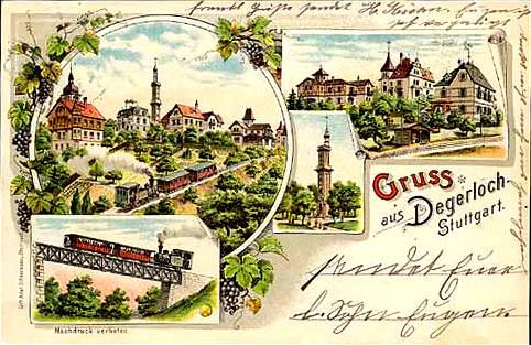 Degerloch Zahnradbahn 1897 Grußbotschaft: „sendet Euer l. Sohn Eugen“